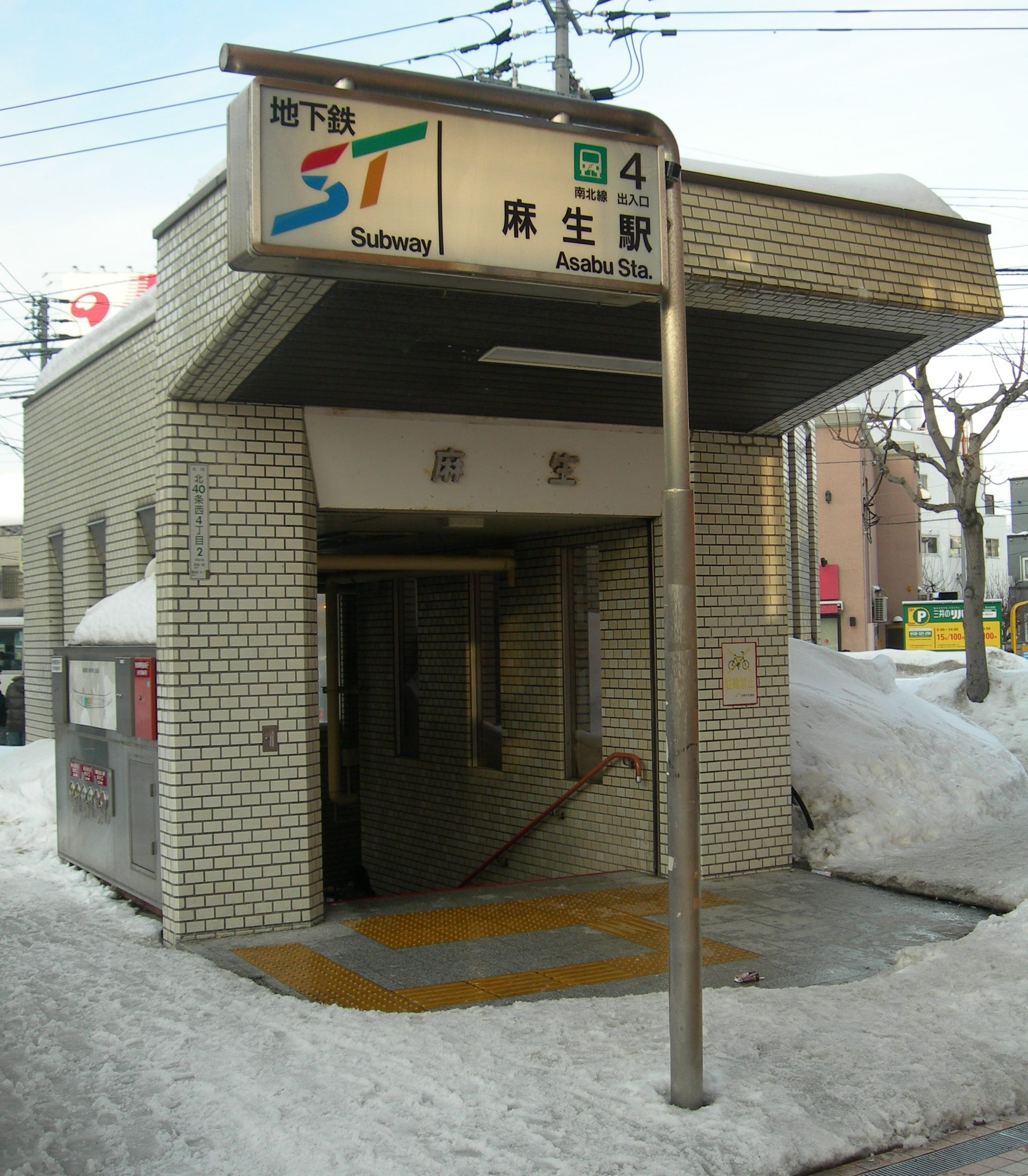 麻生駅4番出口